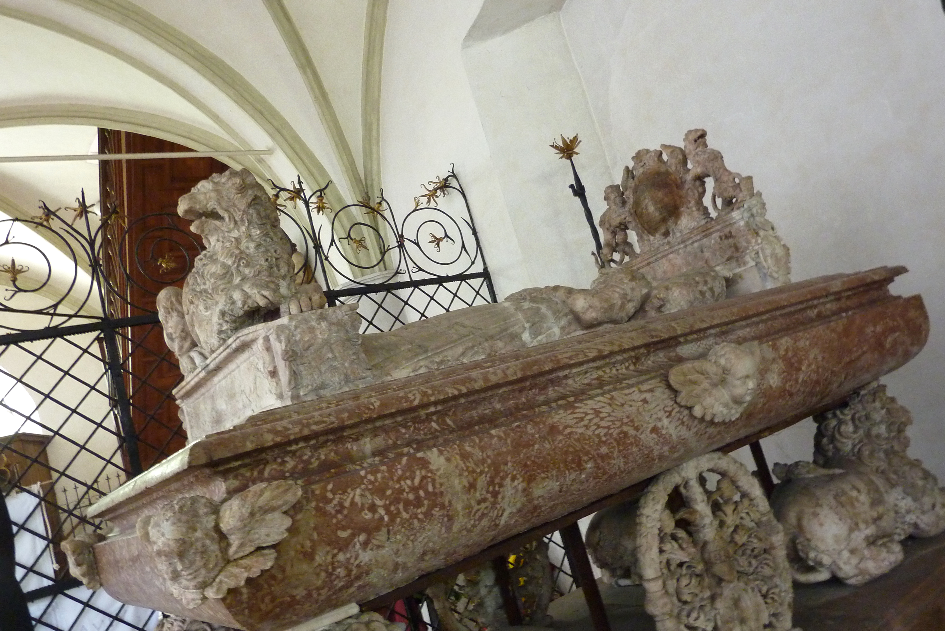 Kenotaph der Pfalzgräfin Elisabeth von Pfalz-Neuburg in der Stadtpfarrkirche St. Martin in Lauingen im Landkreis Dillingen an der Donau (Bayern)